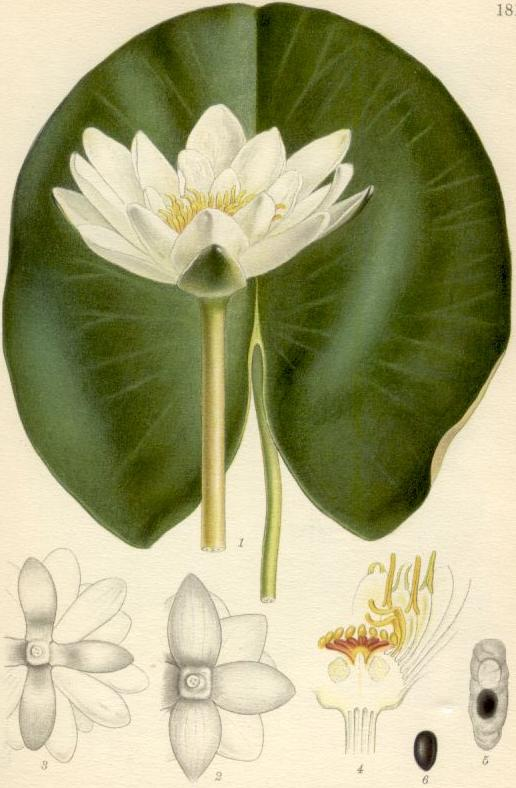 Nymphaea alba blad och blomma, blomma sedd underifrån, förminskad, o av N. alba Presl, blomma av candida i längdsnitt, visande pistillen med det mångstråliga, röda märket och fem ståndare, alla av olika form, frö med sitt slemmiga fröhölje och däri innesluten gasblåsa (3/1), frö utan o (3/1).